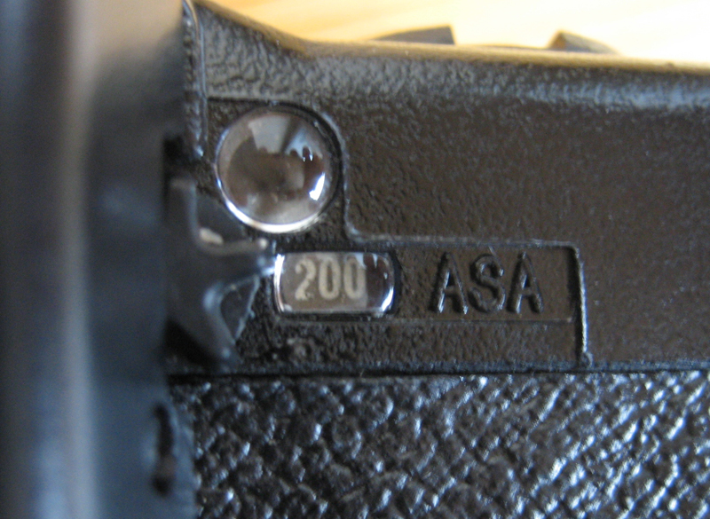 Reglage de la sensibilité du film et photorécepteur sur un Lomo LC-A